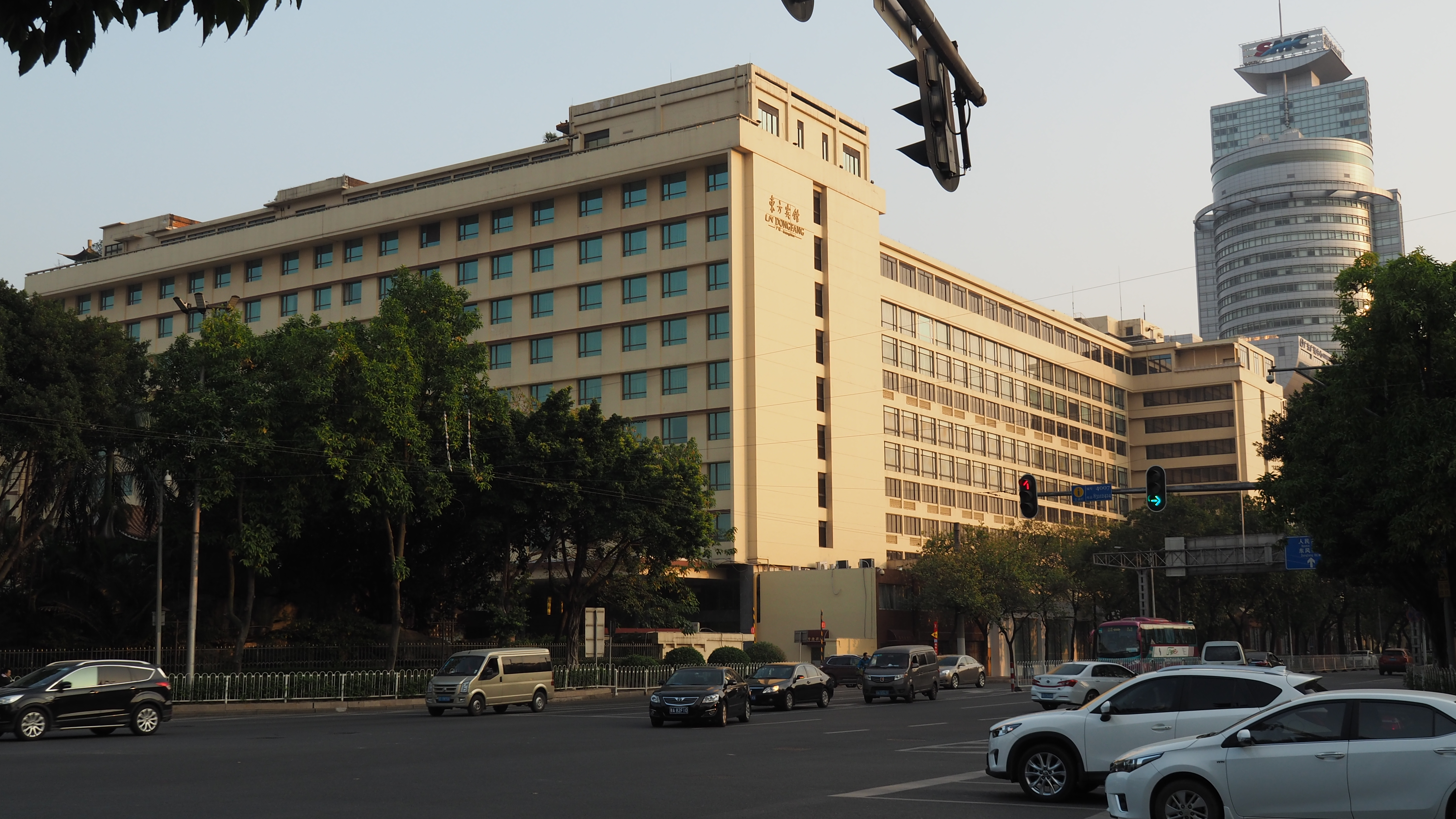 中文（中国大陆）: 广州东方宾馆西楼。位于广东省广州市越秀区流花路120号西楼。